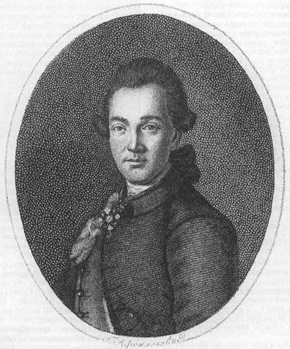 Казаков Матвей Фёдорович